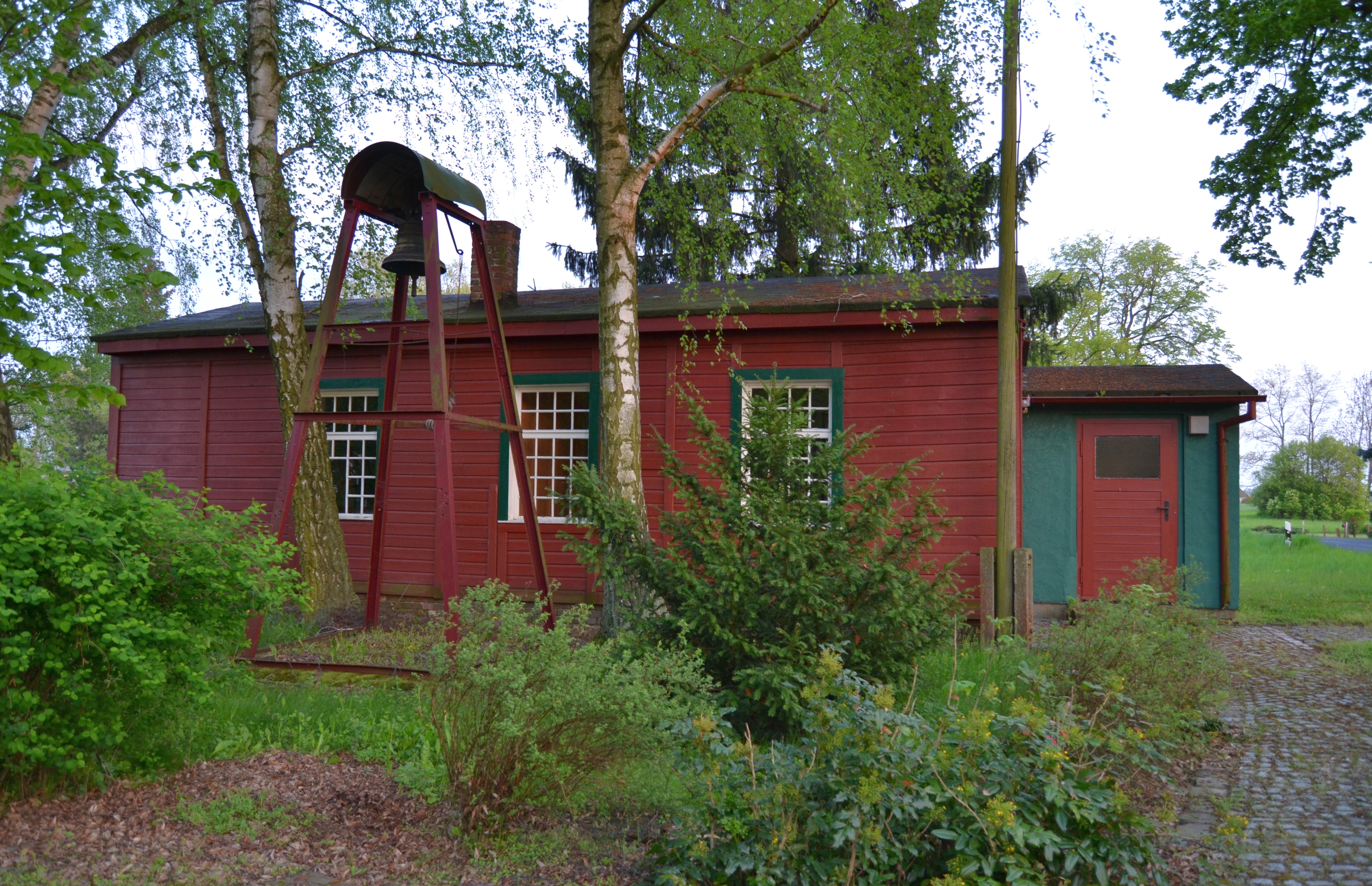 Baudenkmal Behelfskirche mit Kirchenglocke im Glockenschauer in Buschdorf, Gemeinde Zechin.